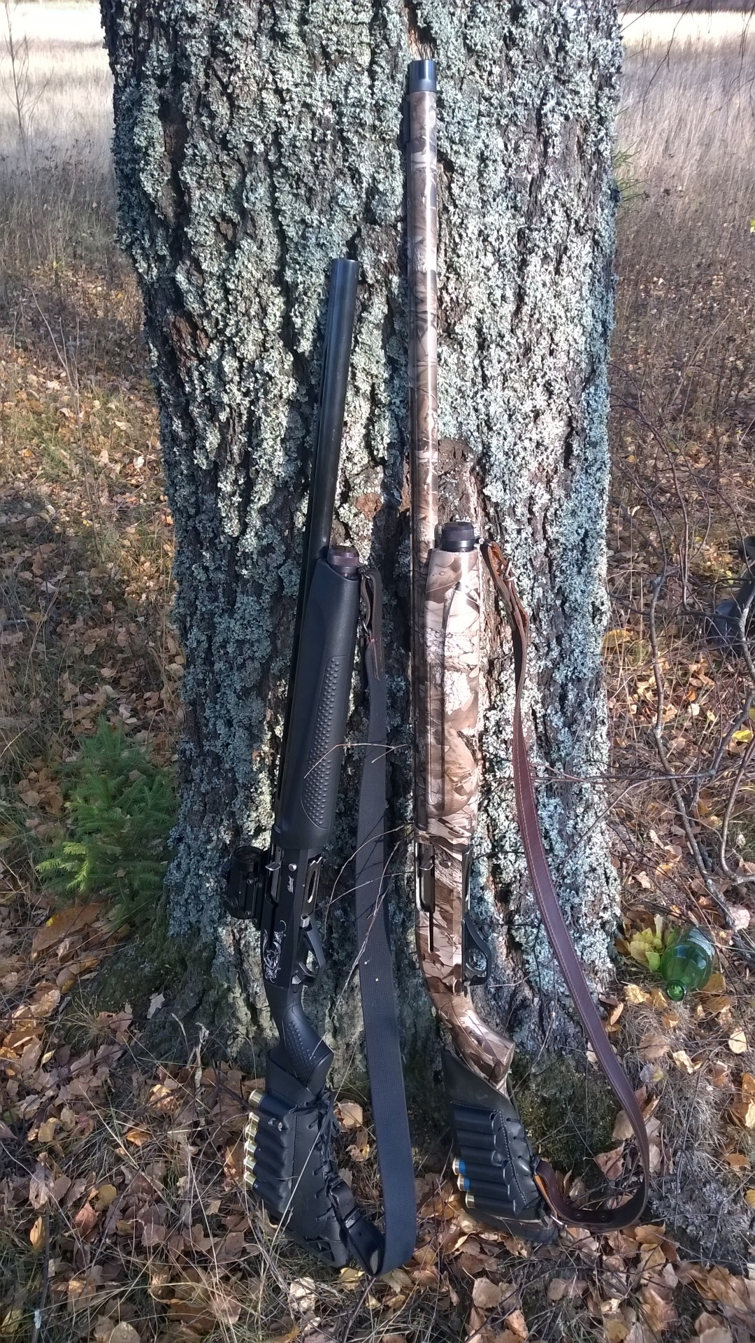 МР-155 и МР-153(камуфл.)